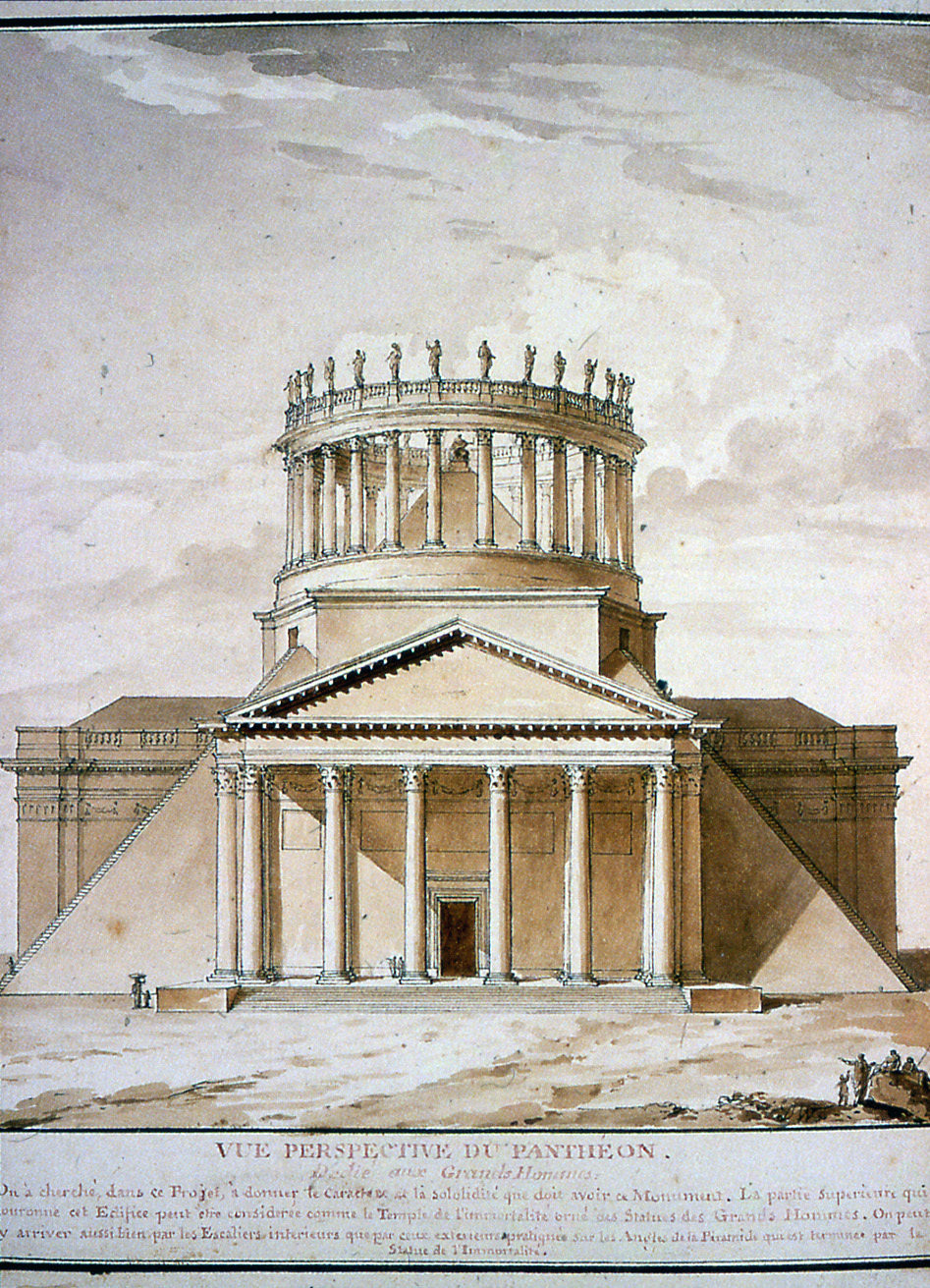 Werk von Charles De Wailly